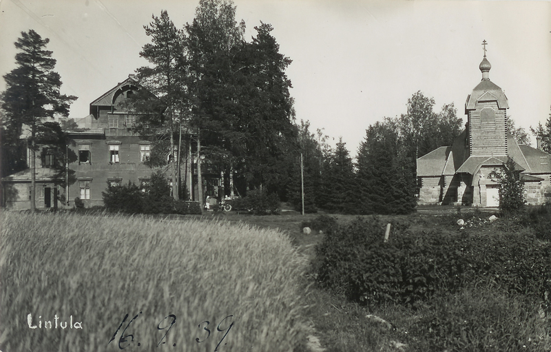 Линтульский монастырь